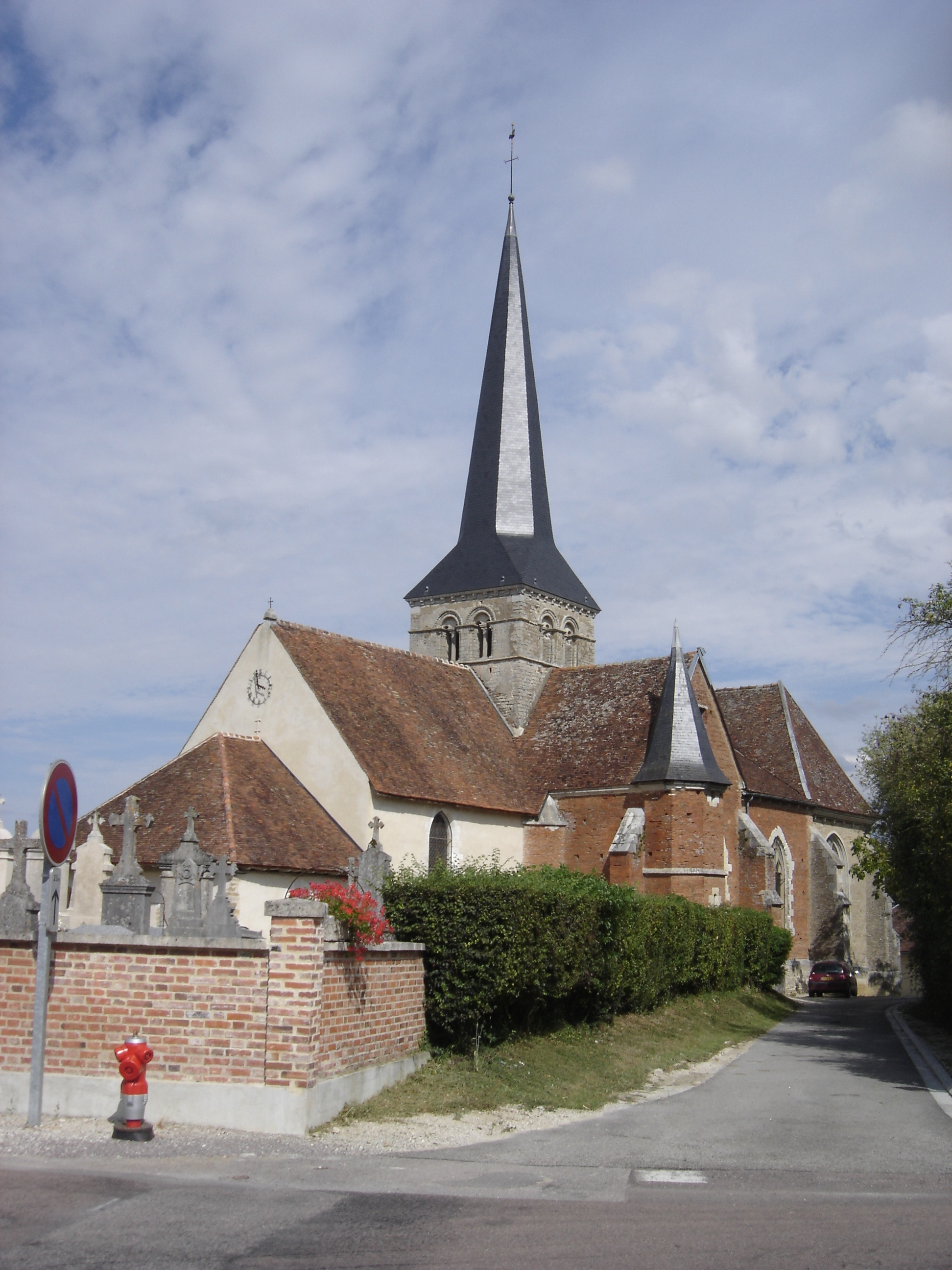 église Saint Gilles de Montreuil sur Barse - Aube - France